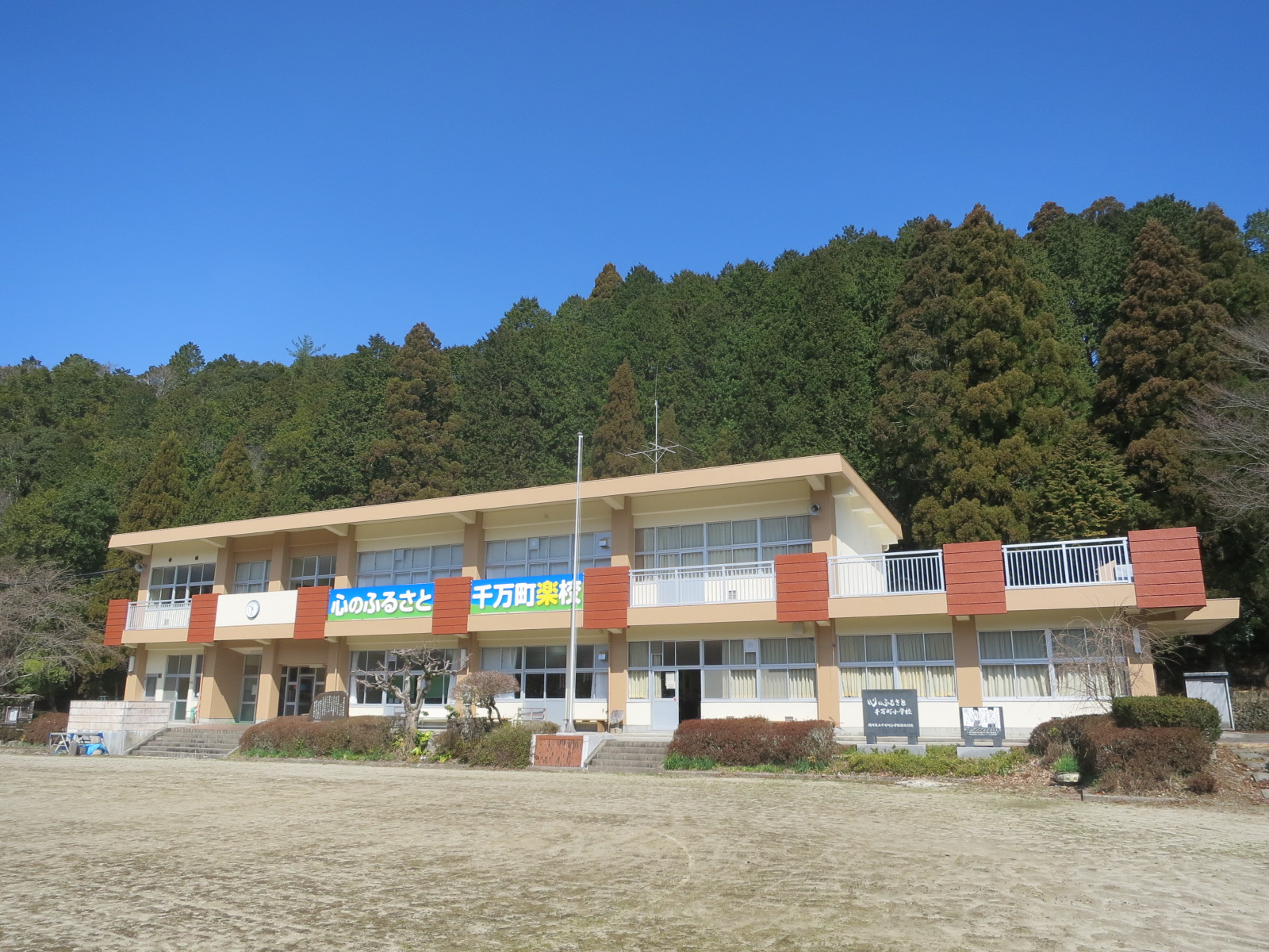 千万町楽校（岡崎市千万町町）